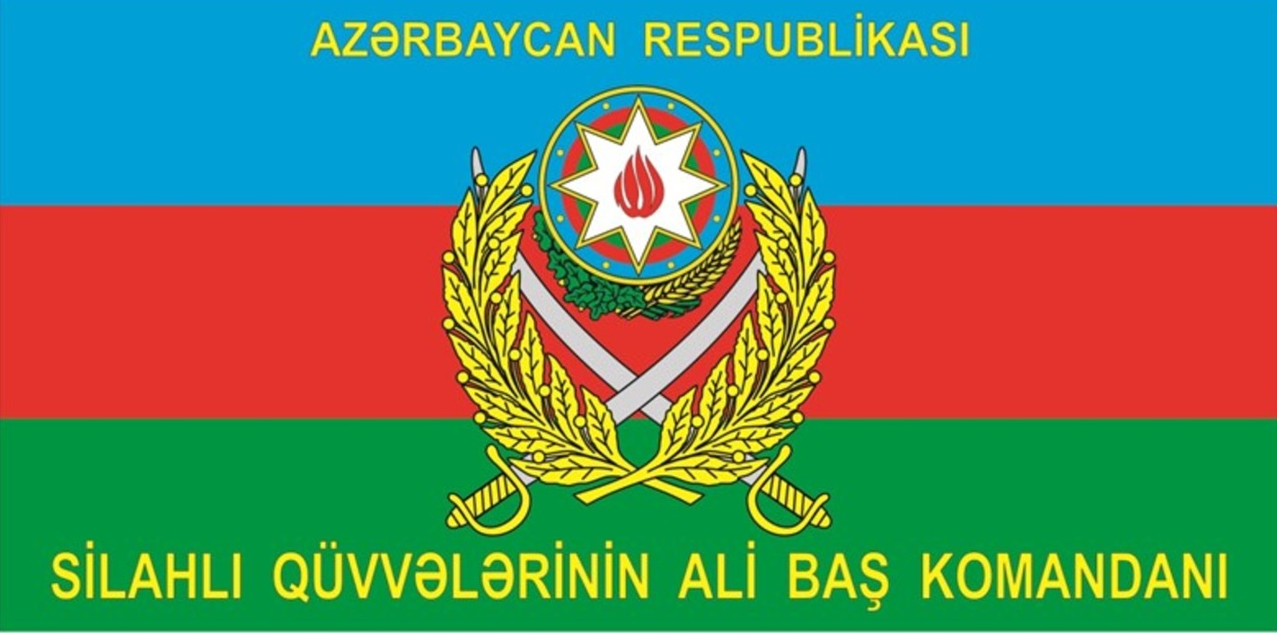 Azərbaycan Silahlı Qüvvələri Ali Baş Komandanının bayrağı